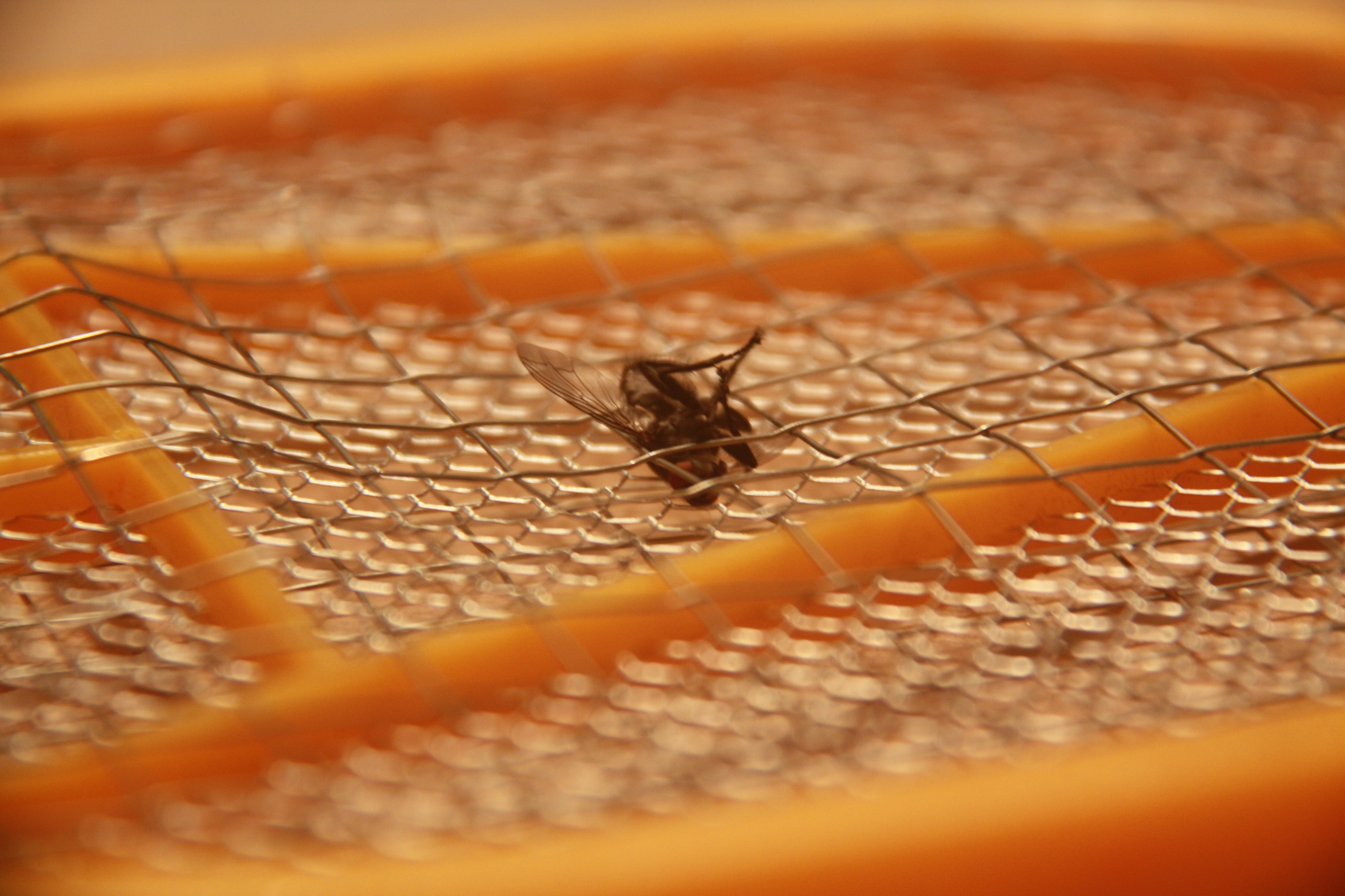 Vlieg gedood door een electronische vliegenmepper